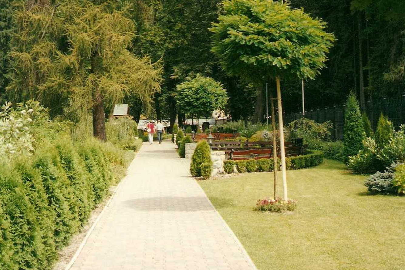 Rajecké Teplice - lázně